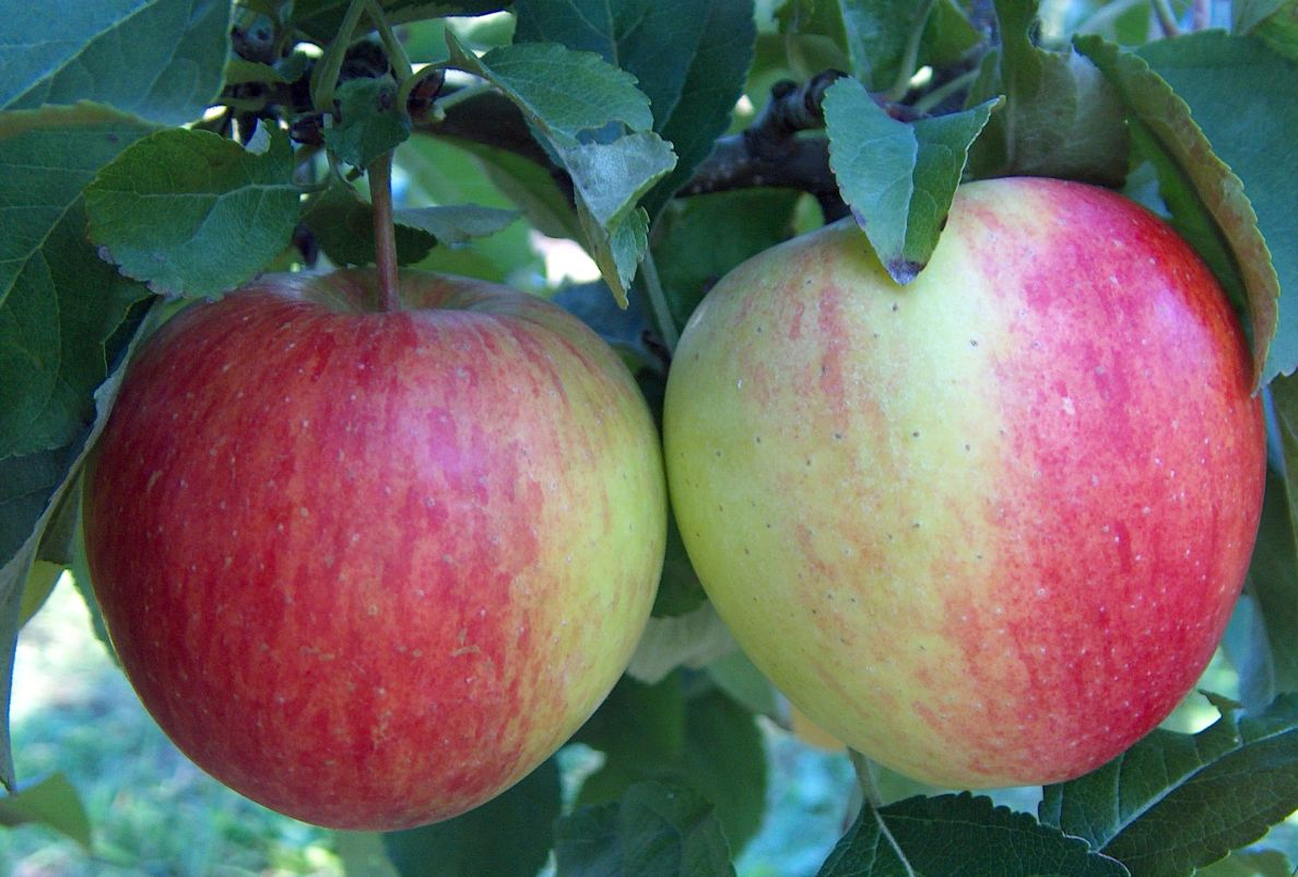 Apfel der Sorte Pinova